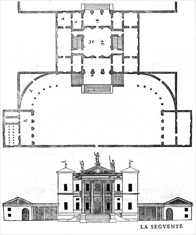 Sezione di Villa Thiene (Cicogna) di Andrea Palladio. Disegno da I quattro libri dell'architettura